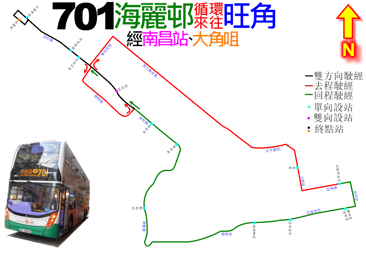 中文（香港）: 新巴701線的走線圖